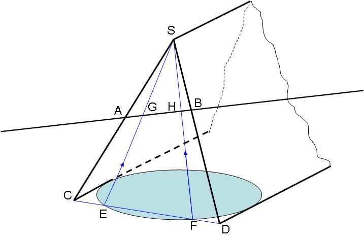 Intersection d'une droite quelconque avec un cône. Vues en 2D